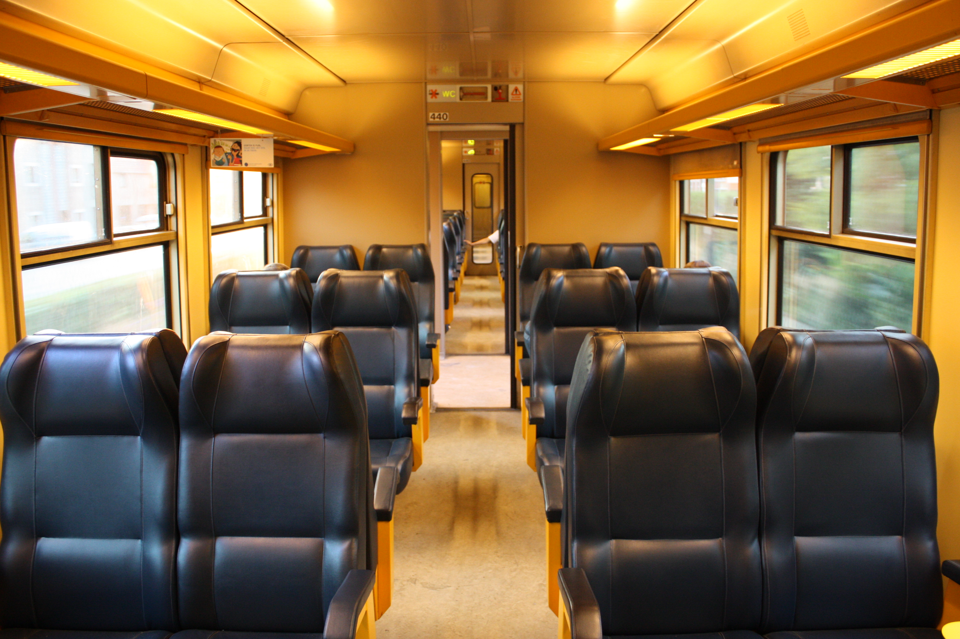 Dit is het interieur van een AM80-treinstel, meerbepaald van het iets luxueuzer ingerecht tussenrijtuig.